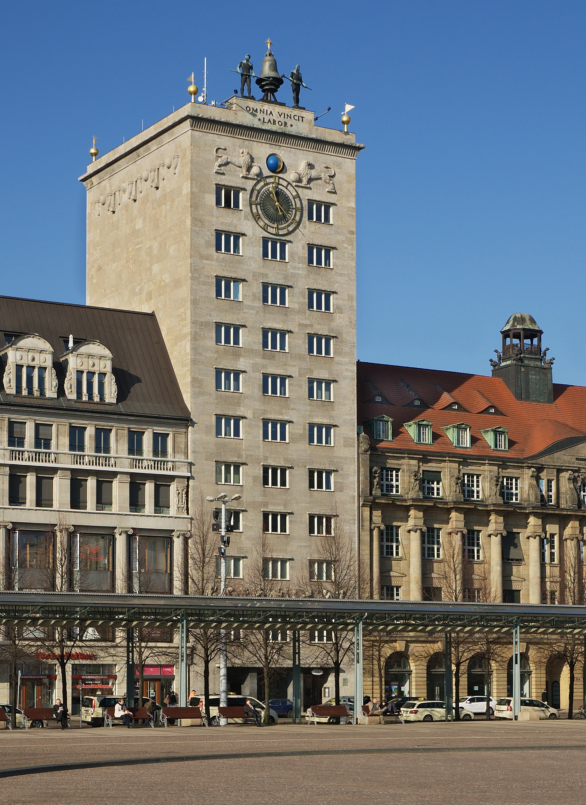 Kroch-Hochhaus, Leipzig 2011.